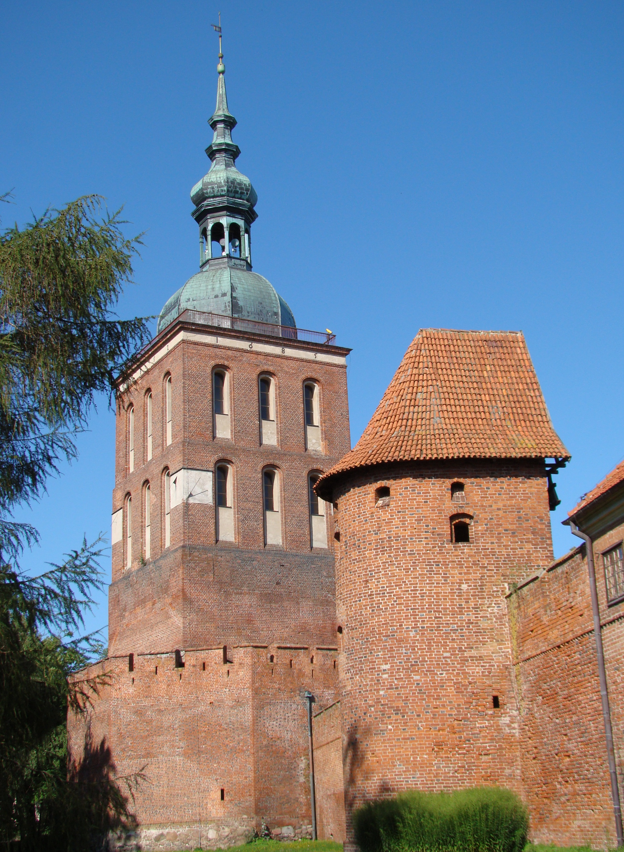 wieża Radziejowskiego (dzwonnica)